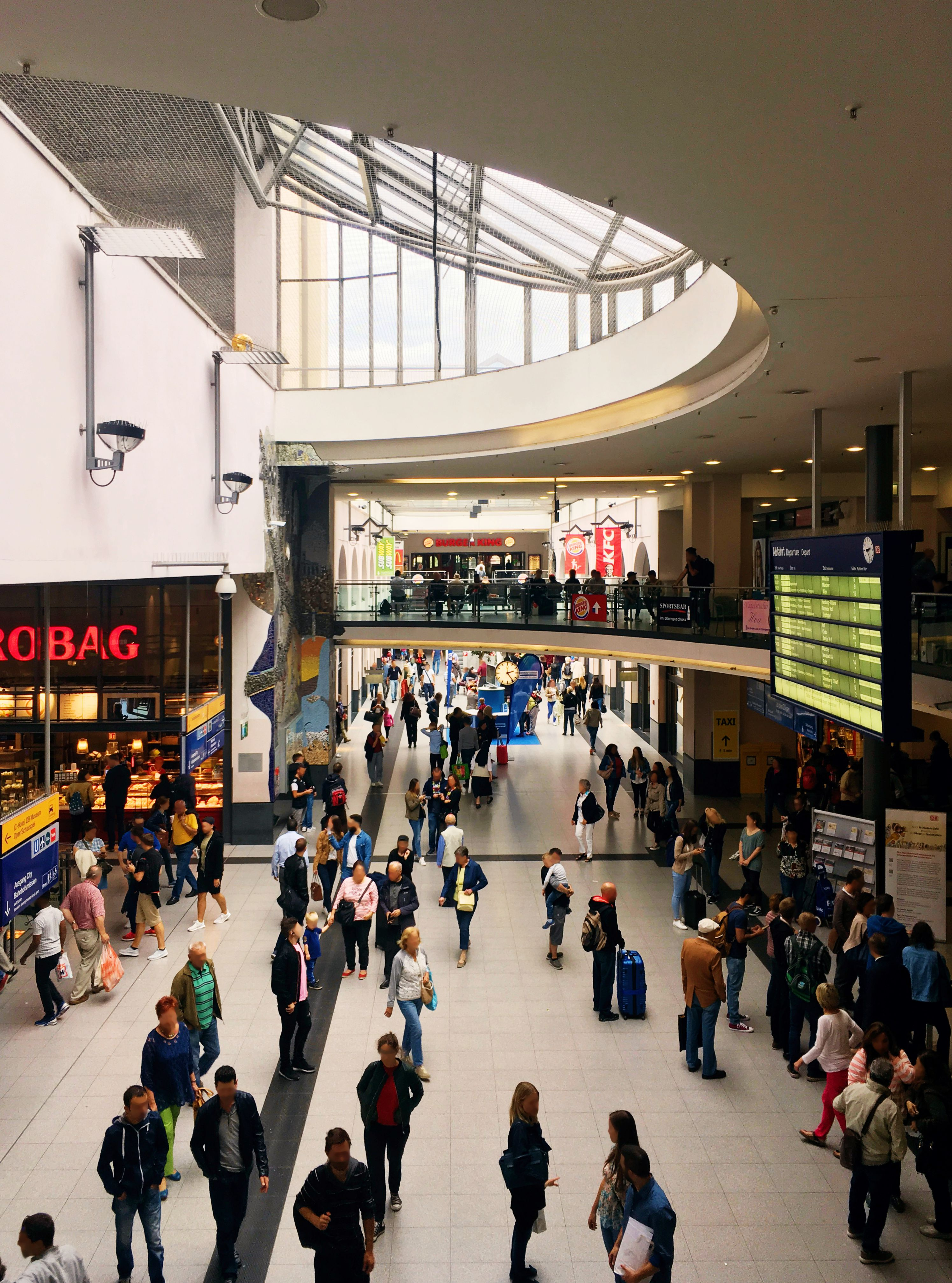 Mittelhalle des Nürnberger Hauptbahnhofs.